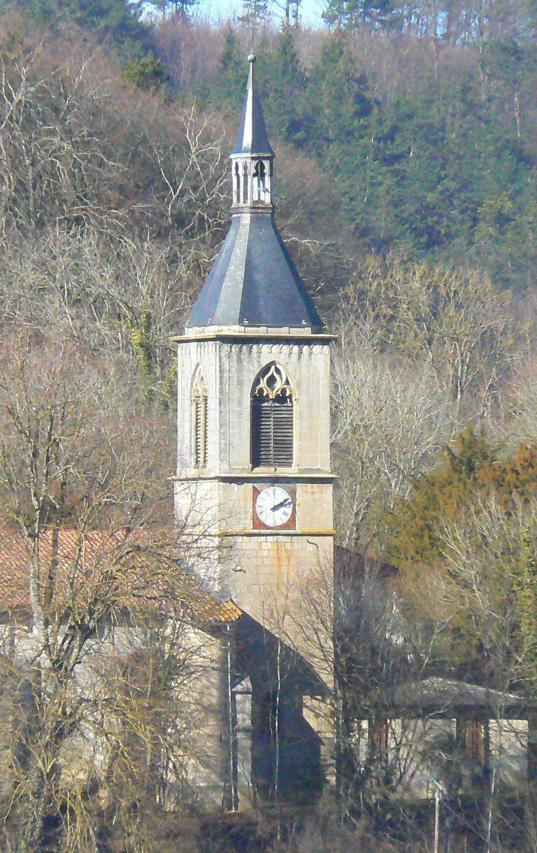 église creuë clocher